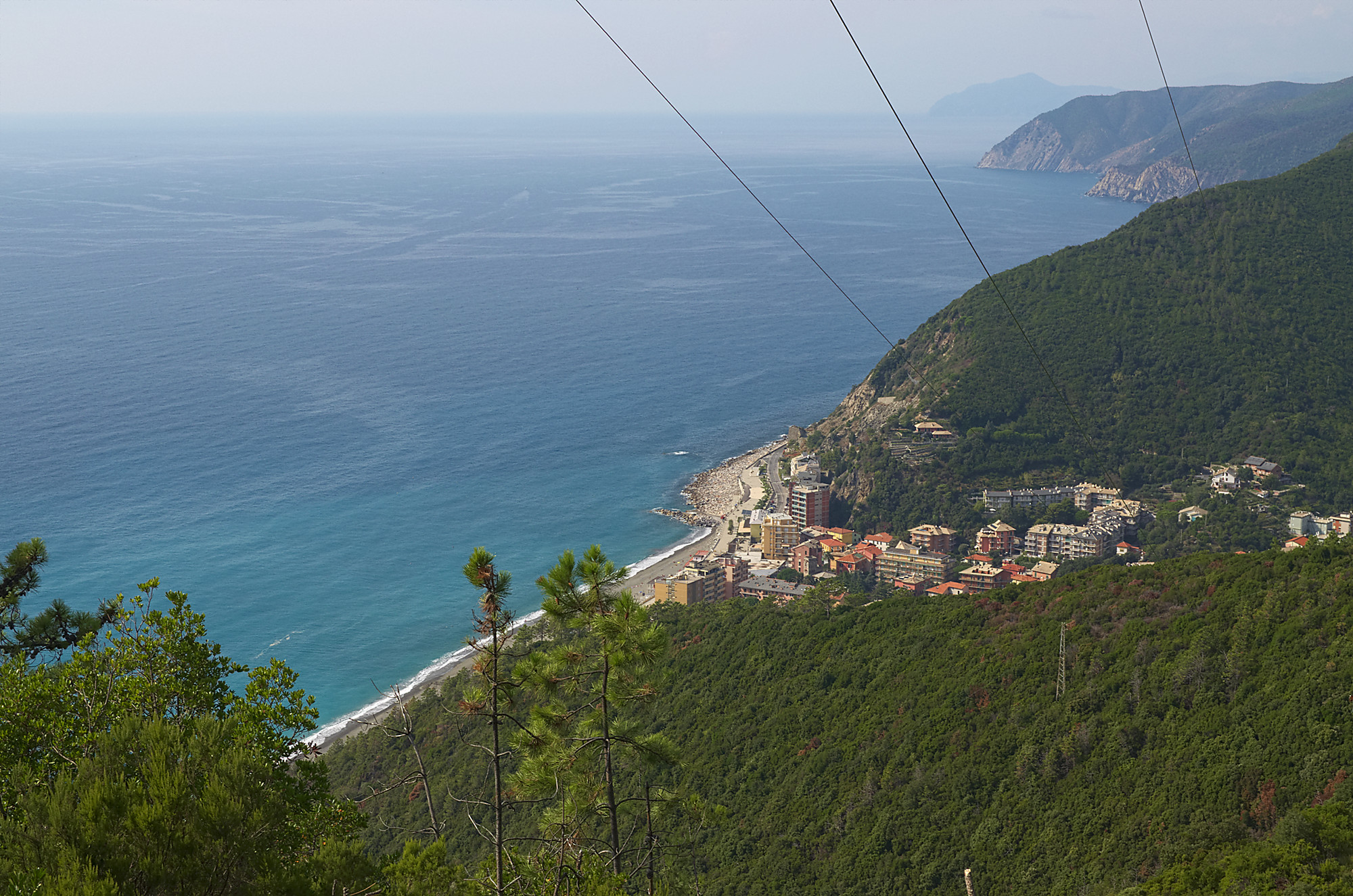 Deiva